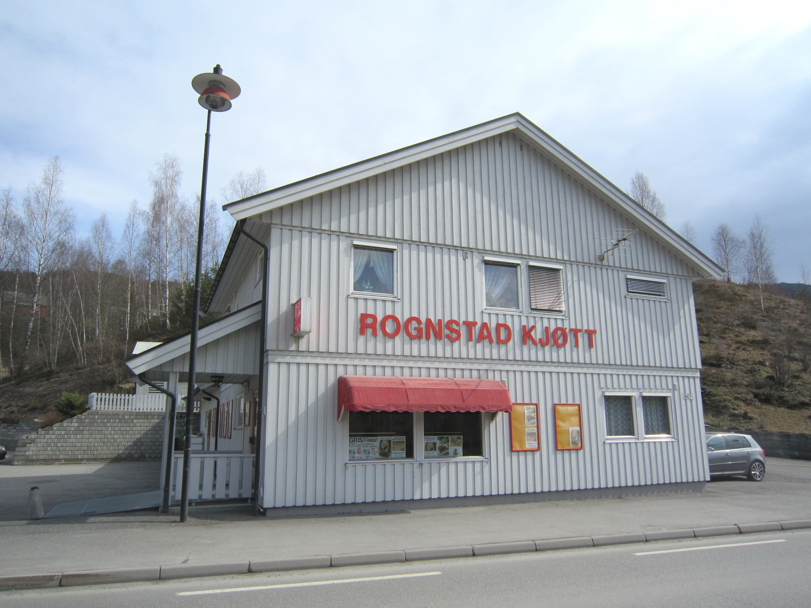 Fylkesvei 357 går gjennom Tretten sentrum.